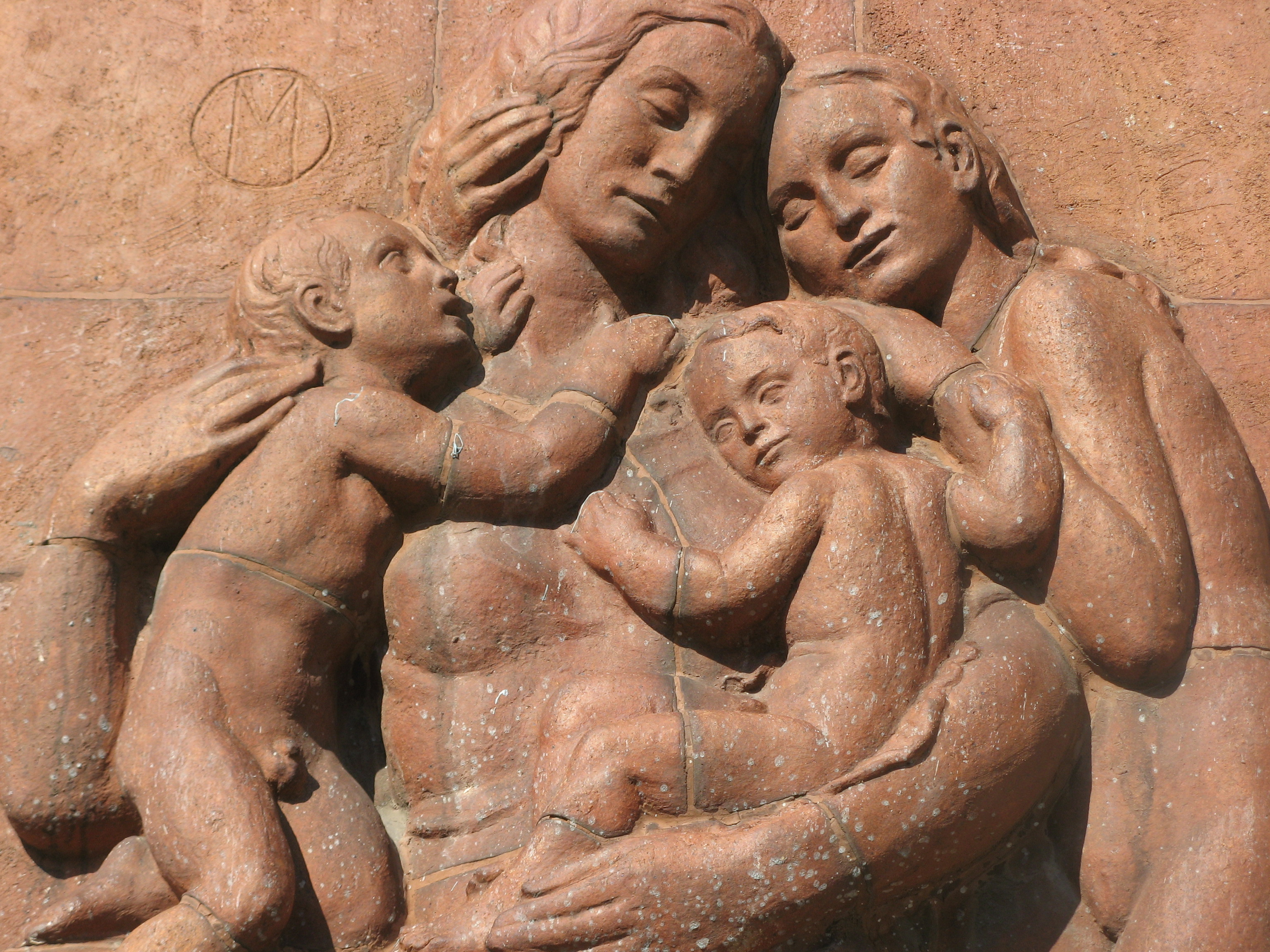 Mutter mit Kindern, Detail (1951), Keramikrelief von Moiret, Ettenreichgasse 42-44, Wien-Favoriten